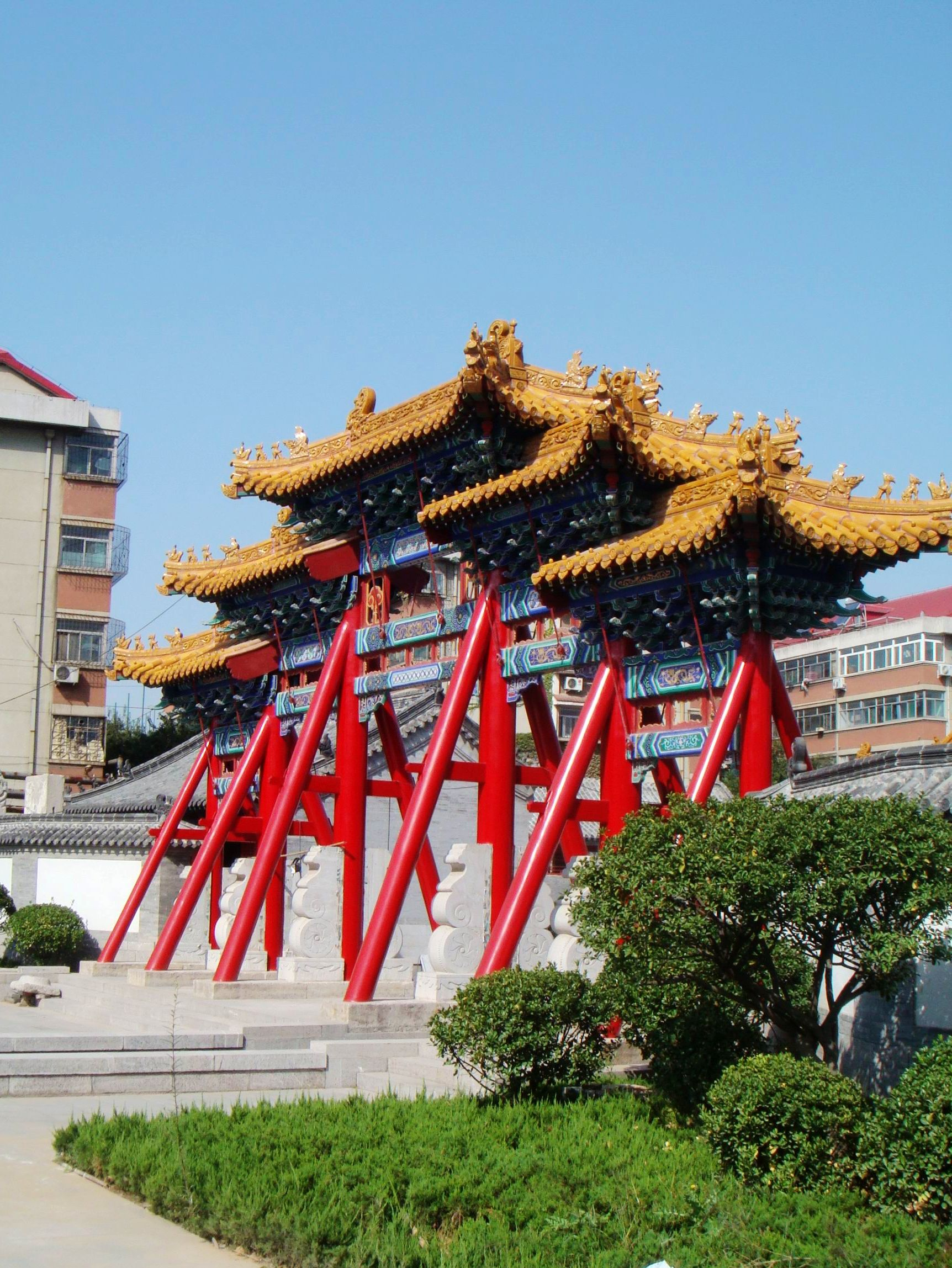 济南府学文庙，图为泮池北侧的五间六柱牌坊。